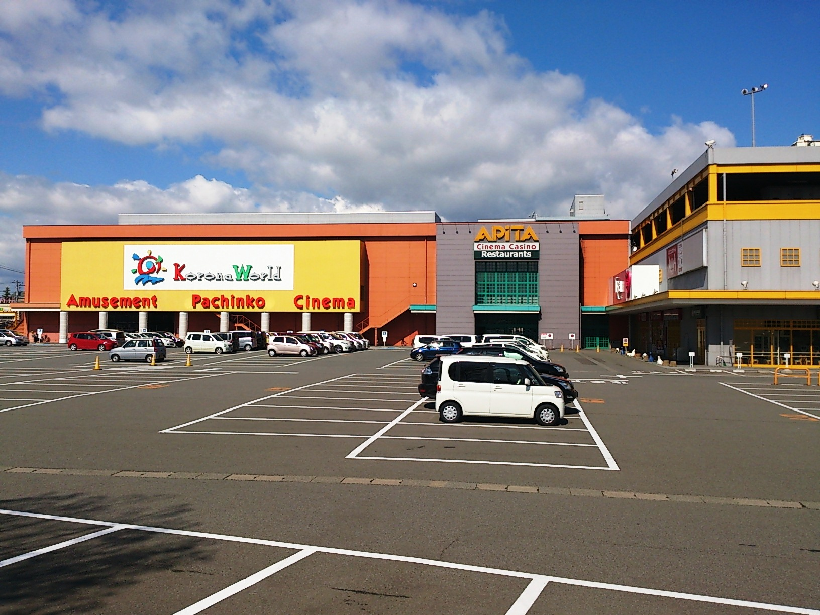 コロナワールド館